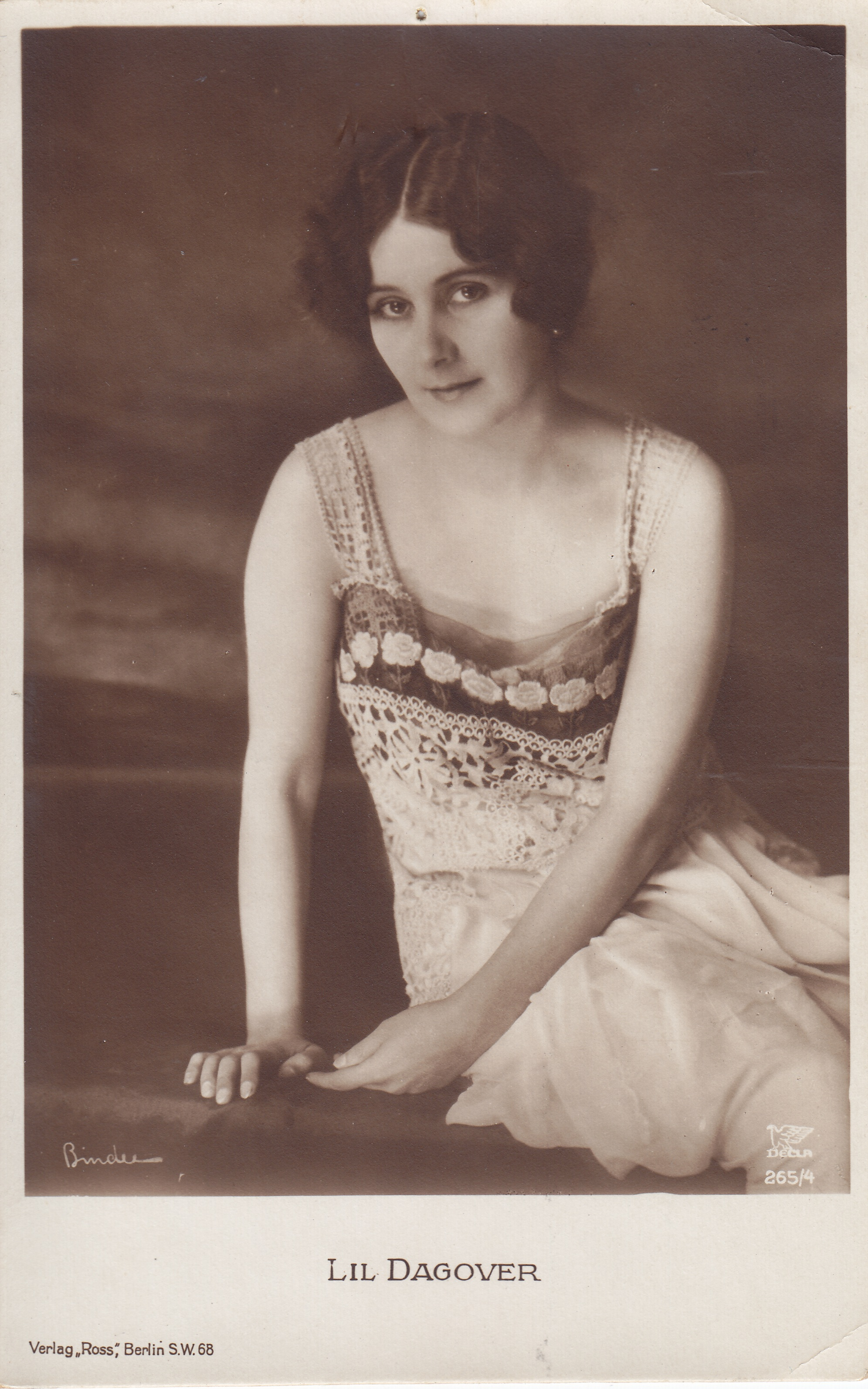 Portret van Lil Dagover, Ross Verlag 265/4